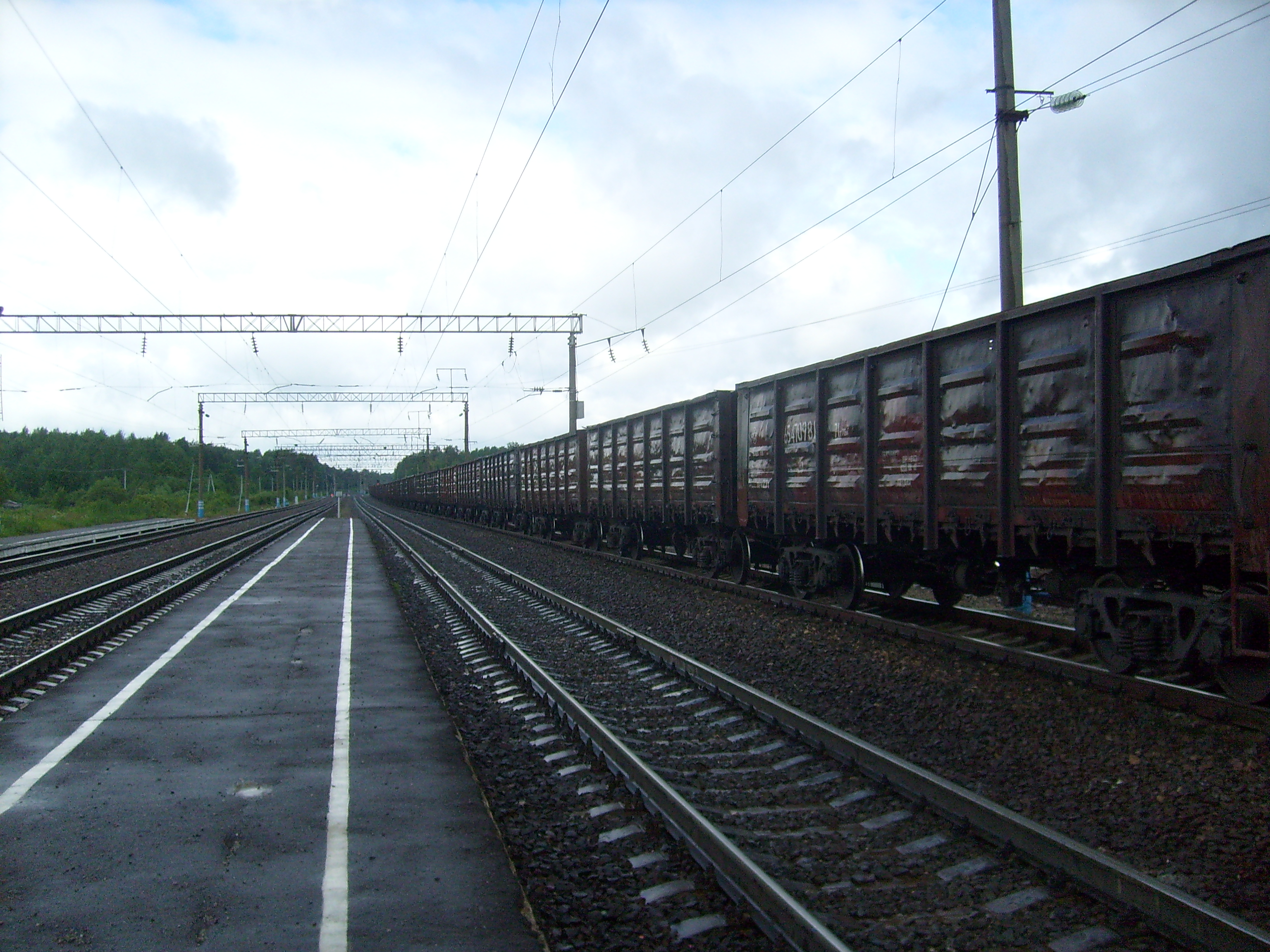 Состав из полувагонов после дождя